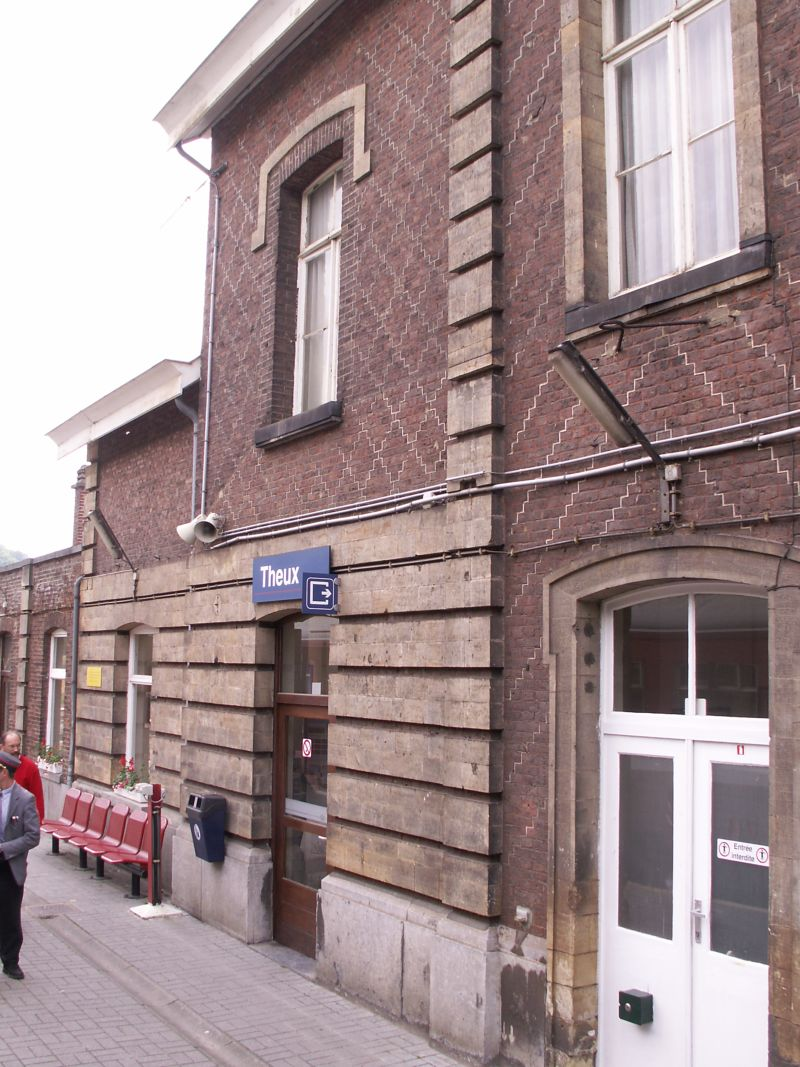 gare de Theux